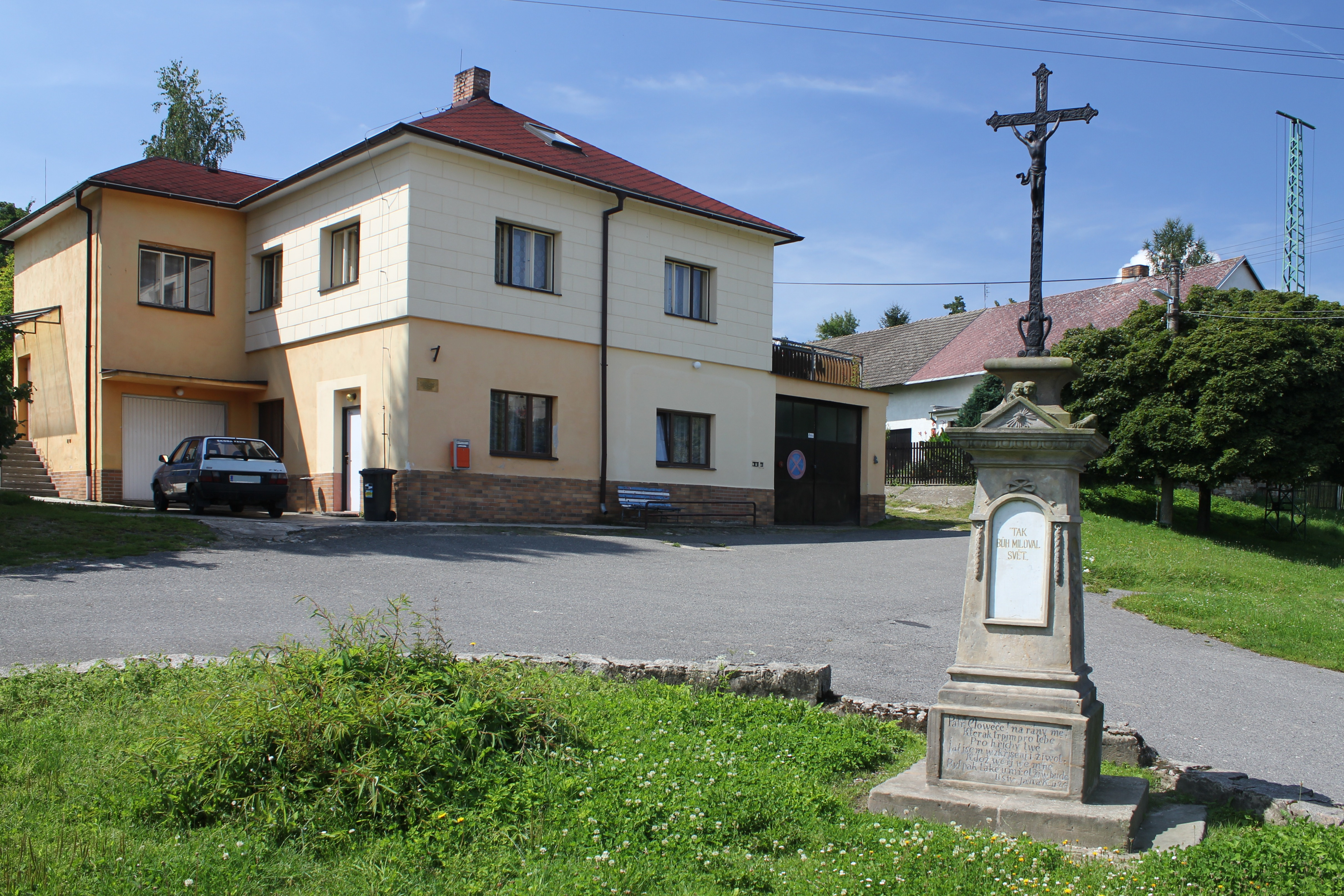 Drahotice, Chocnějovice